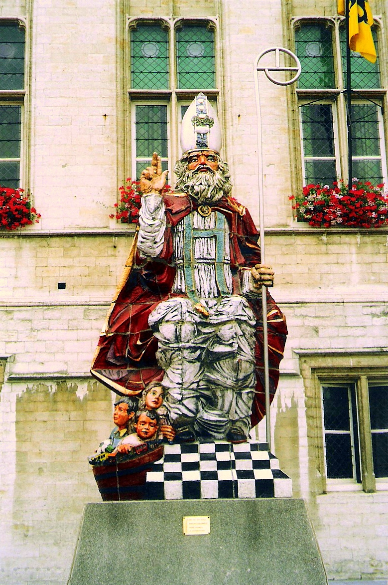 ST. NIKLAAS - Statue of Saint-Nicolas/Sinterklaas in Sint-Niklaas